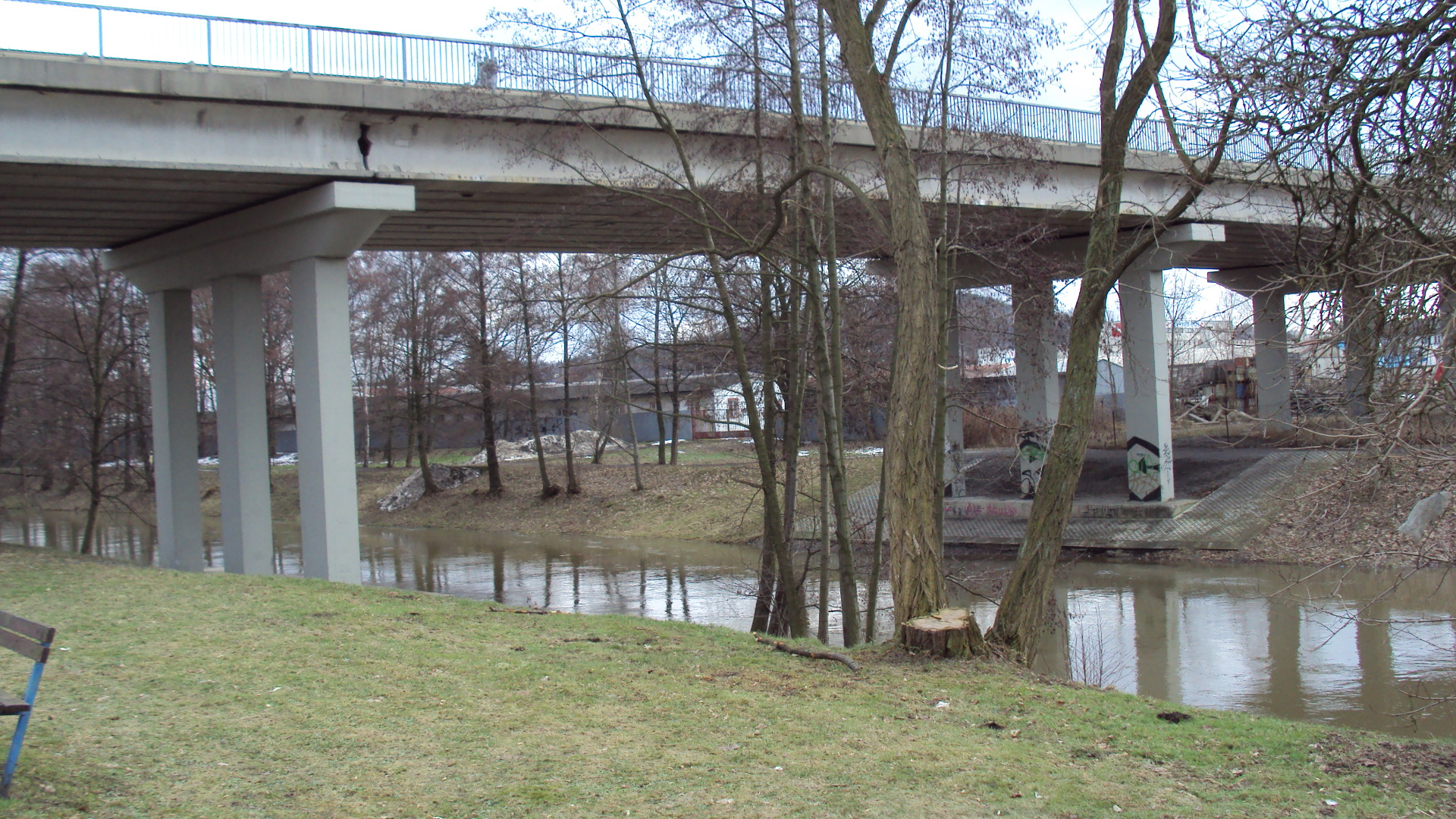 Česky: Viadukt vede nad půlkou České Lípy, i přes Ploučnici